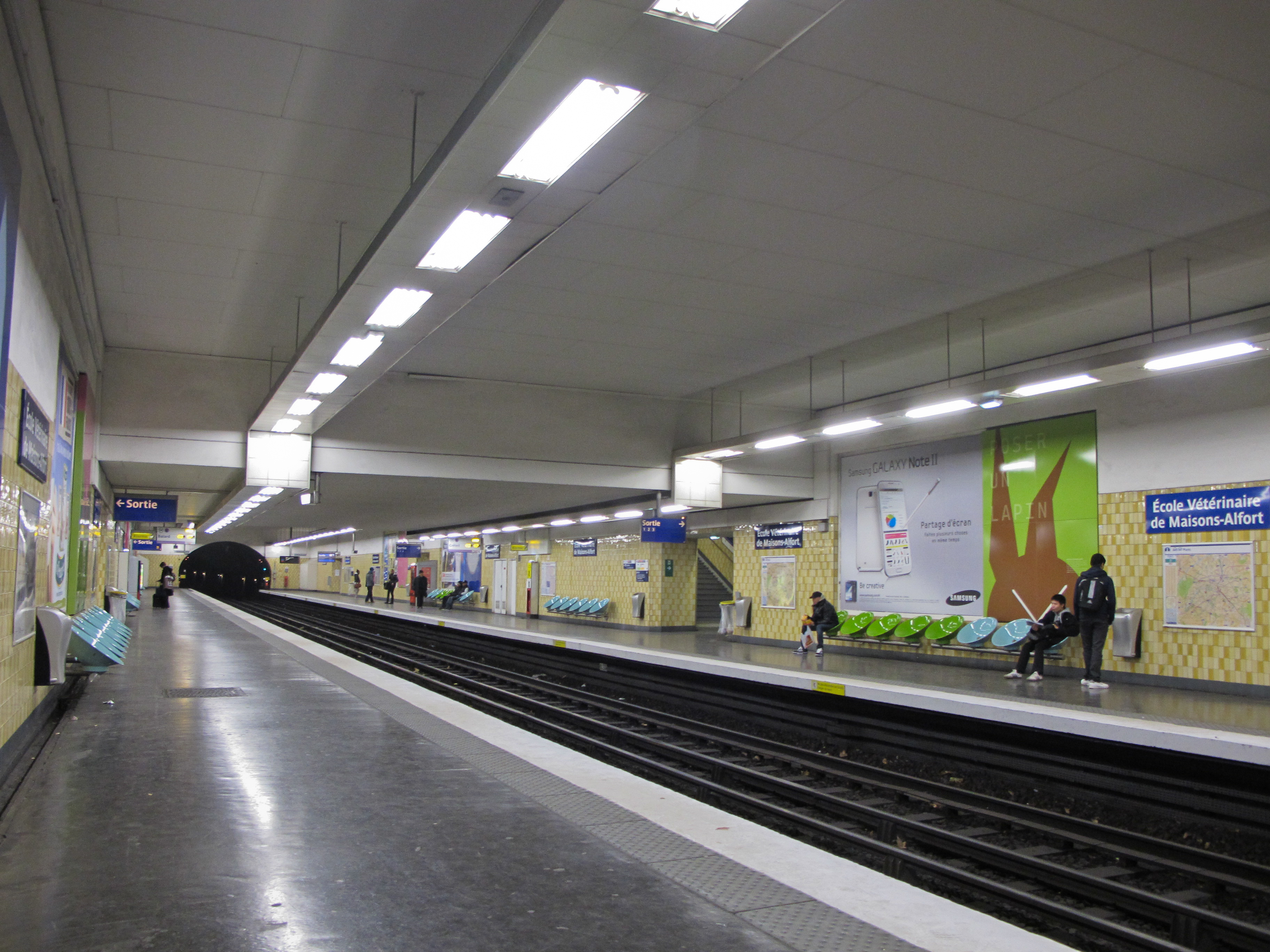 Station École Vétérinaire de Maisons-Alfort. Ligne 8 du métro de Paris - Maisons-Alfort., France